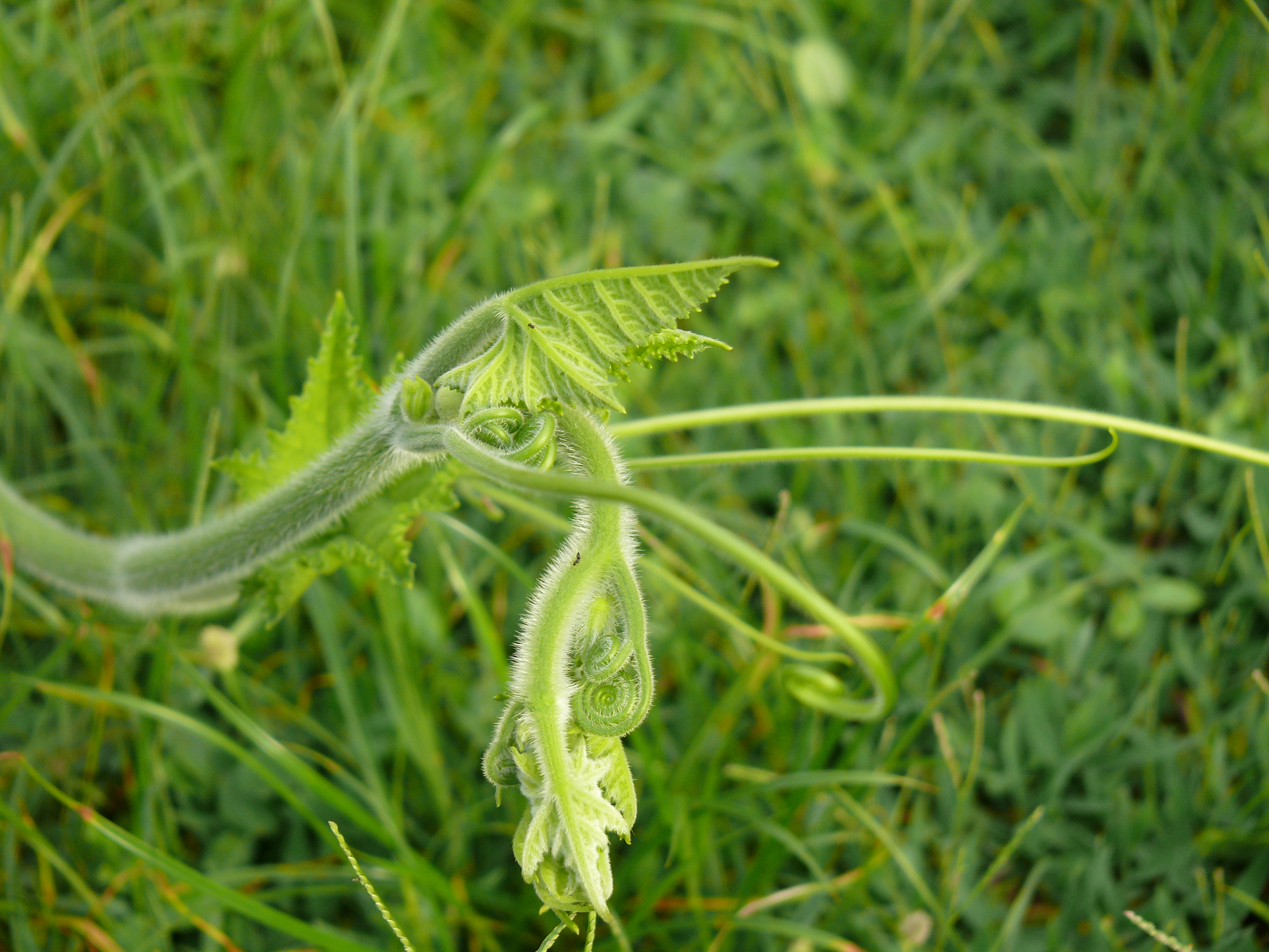 Cucurbita pepo